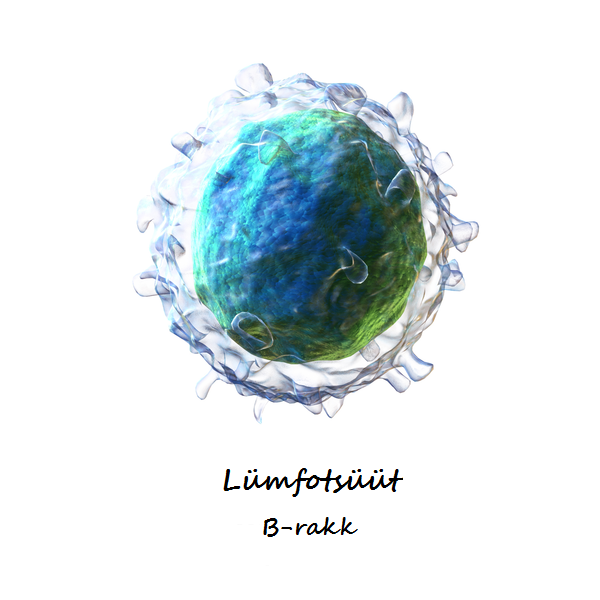 3D pilt B-lümfotsüüdist